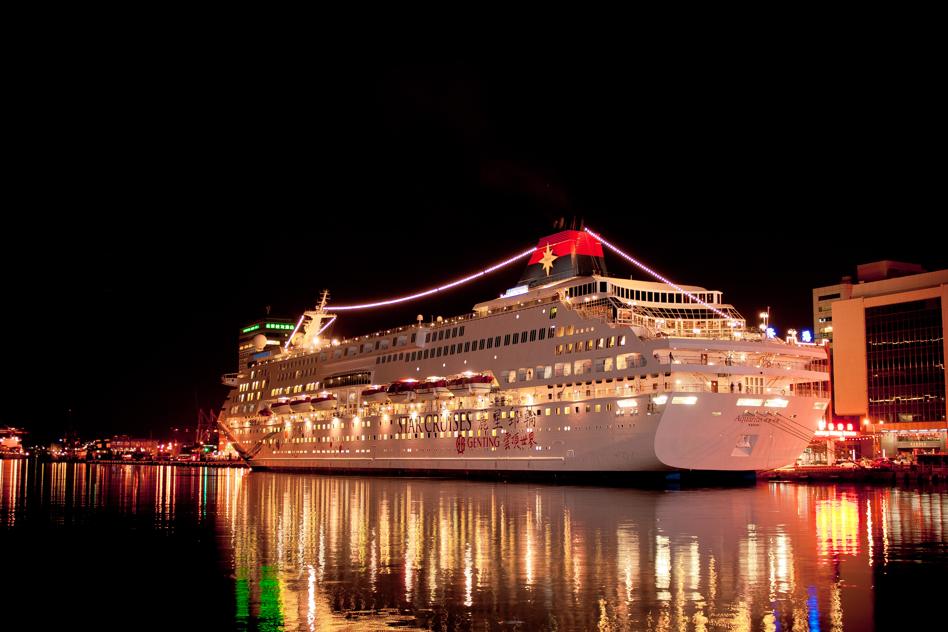 麗星郵輪寶瓶星號停泊基隆港東岸碼頭時的左舷夜景。